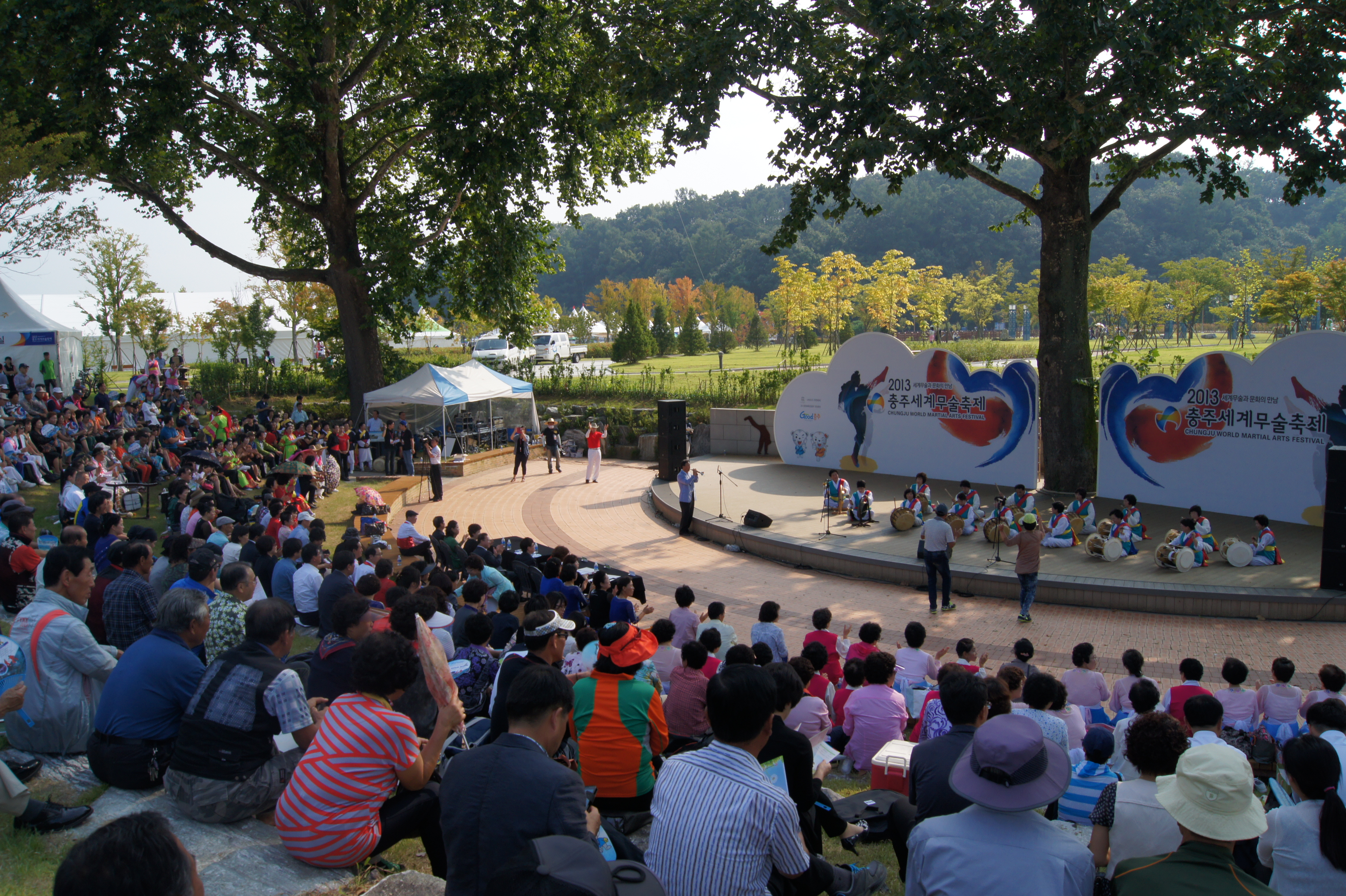 지역 문화경연행사